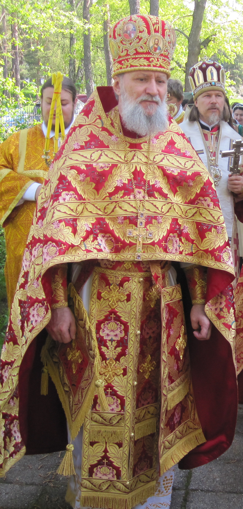 Rovasti Viktor Lioutik